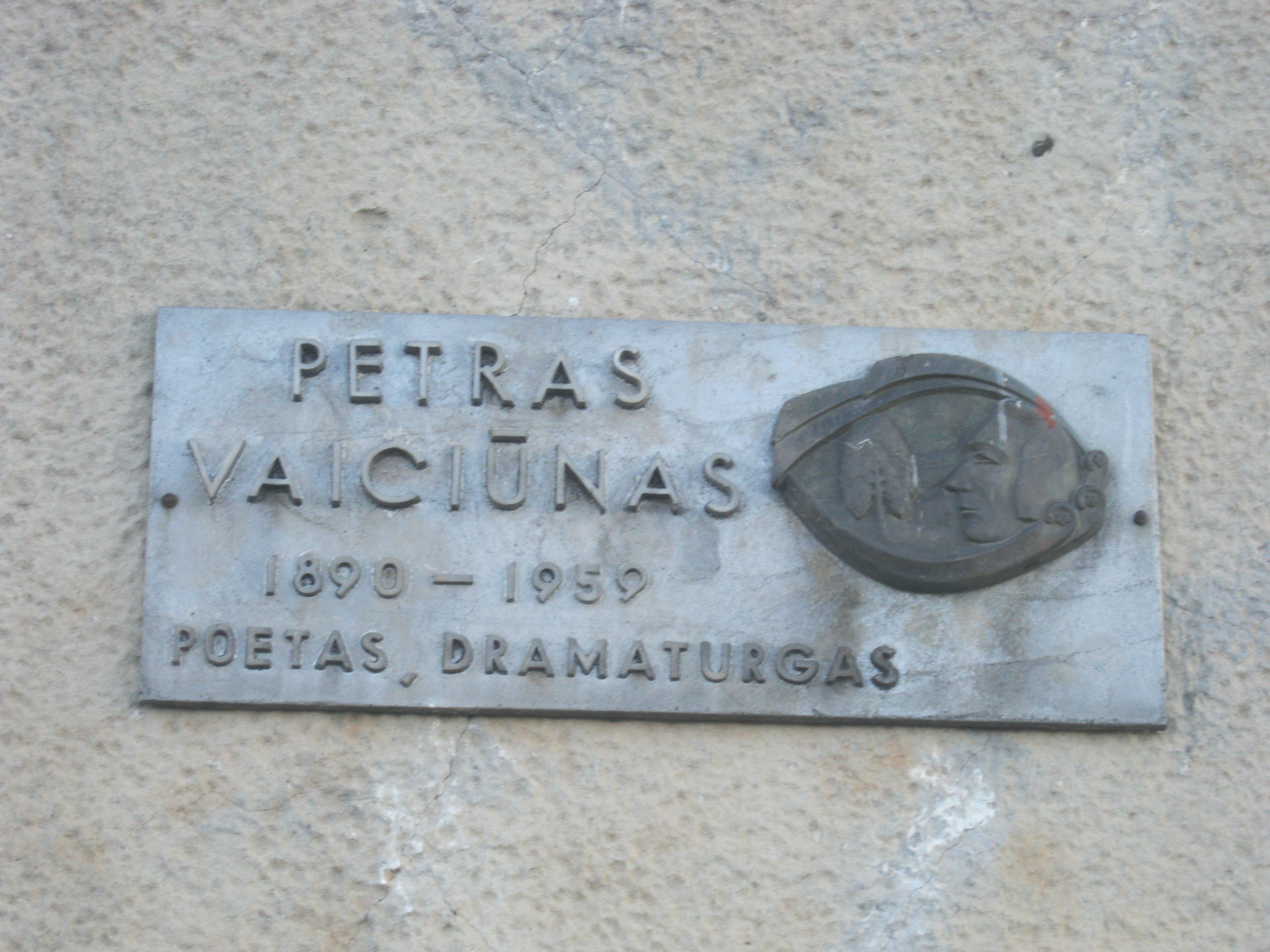 Atminimo lenta Petrui Vaičiūnui, Jonava, P.Vaičiūno g. 2a